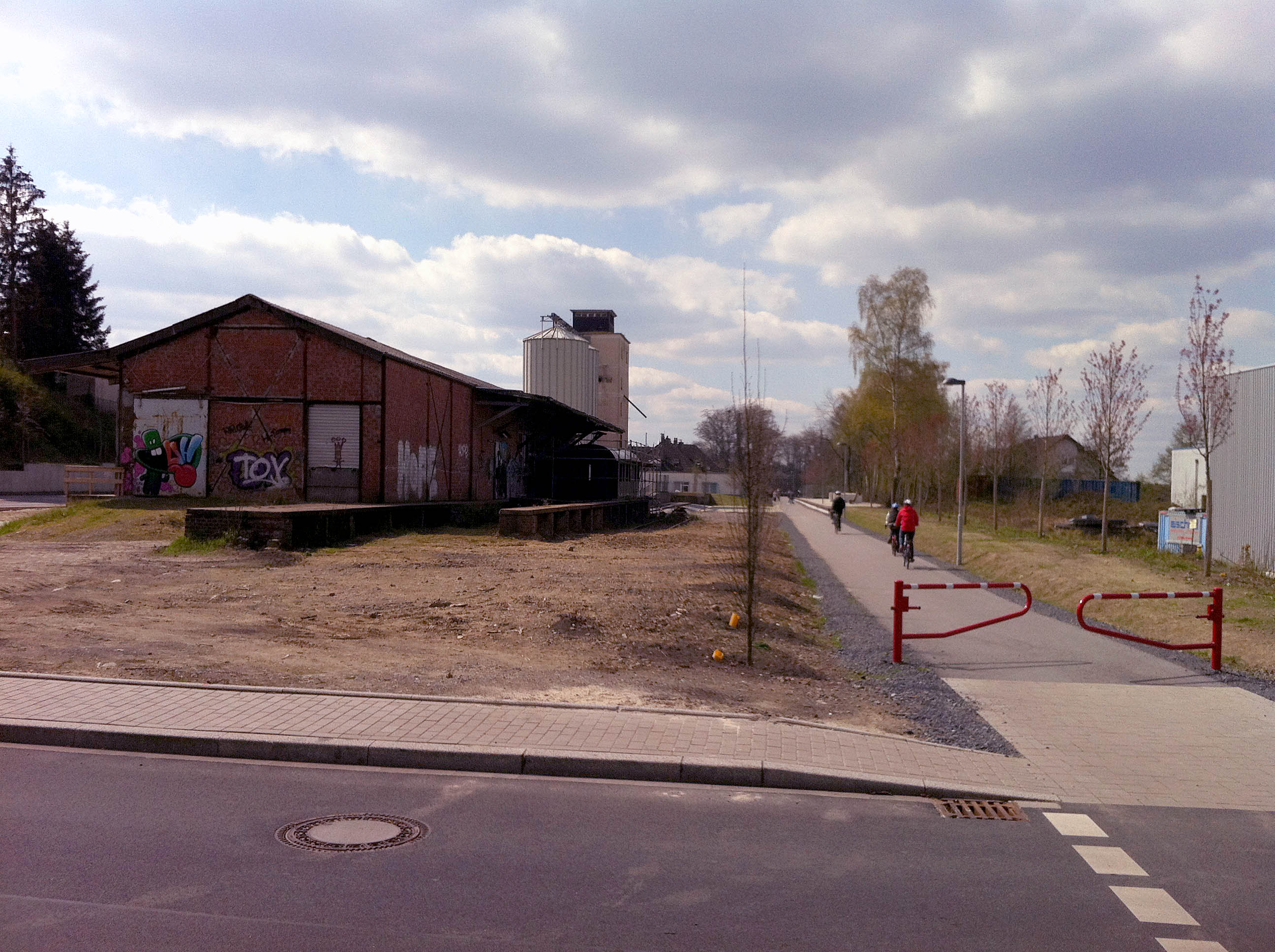 Ehemaliges Lagergebäude des Bahnhofs Heiligenhaus mit Panoramaradweg (Trasse Niederbergbahn), vom Osten aus gesehen